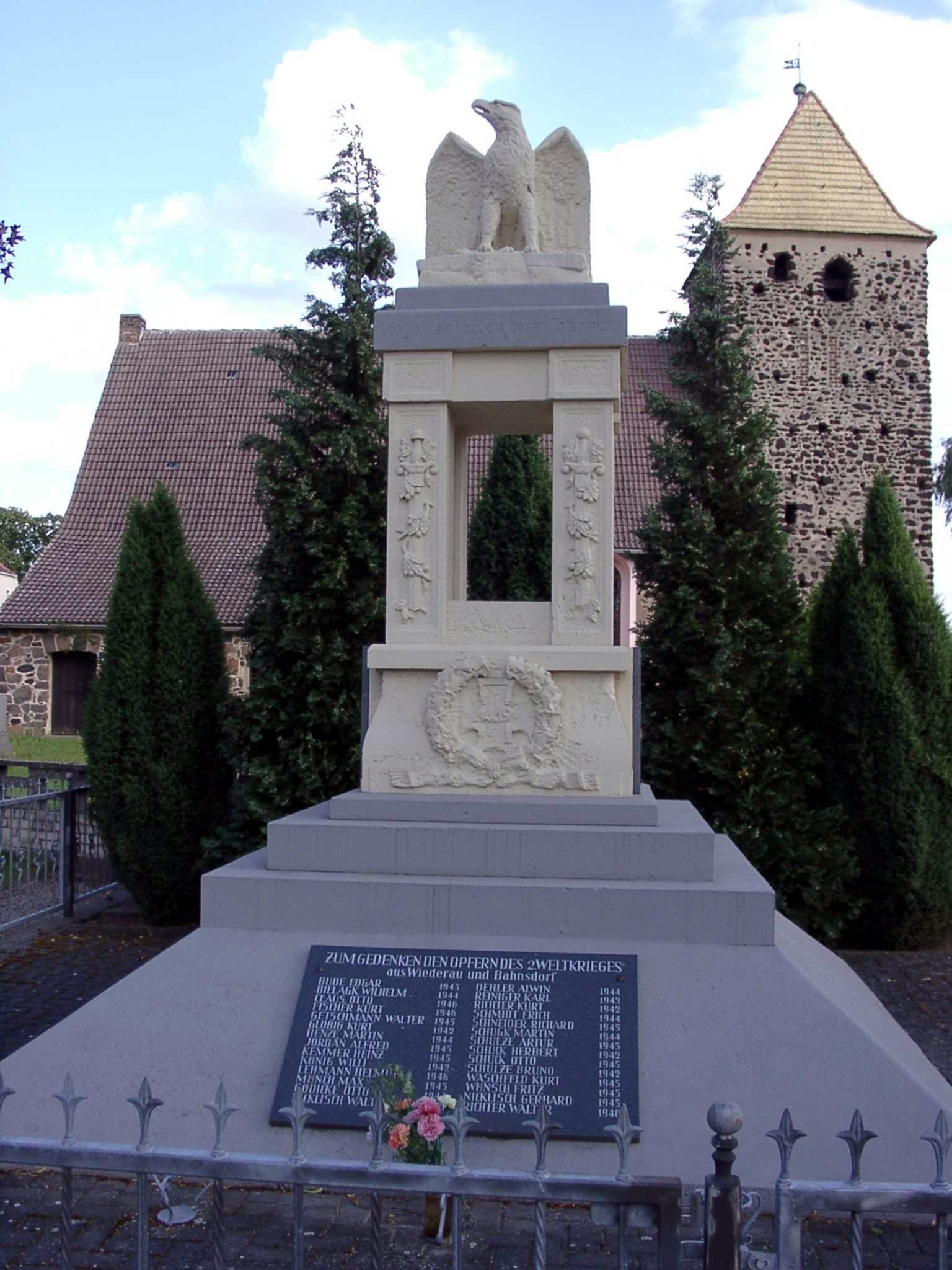 Wiederau